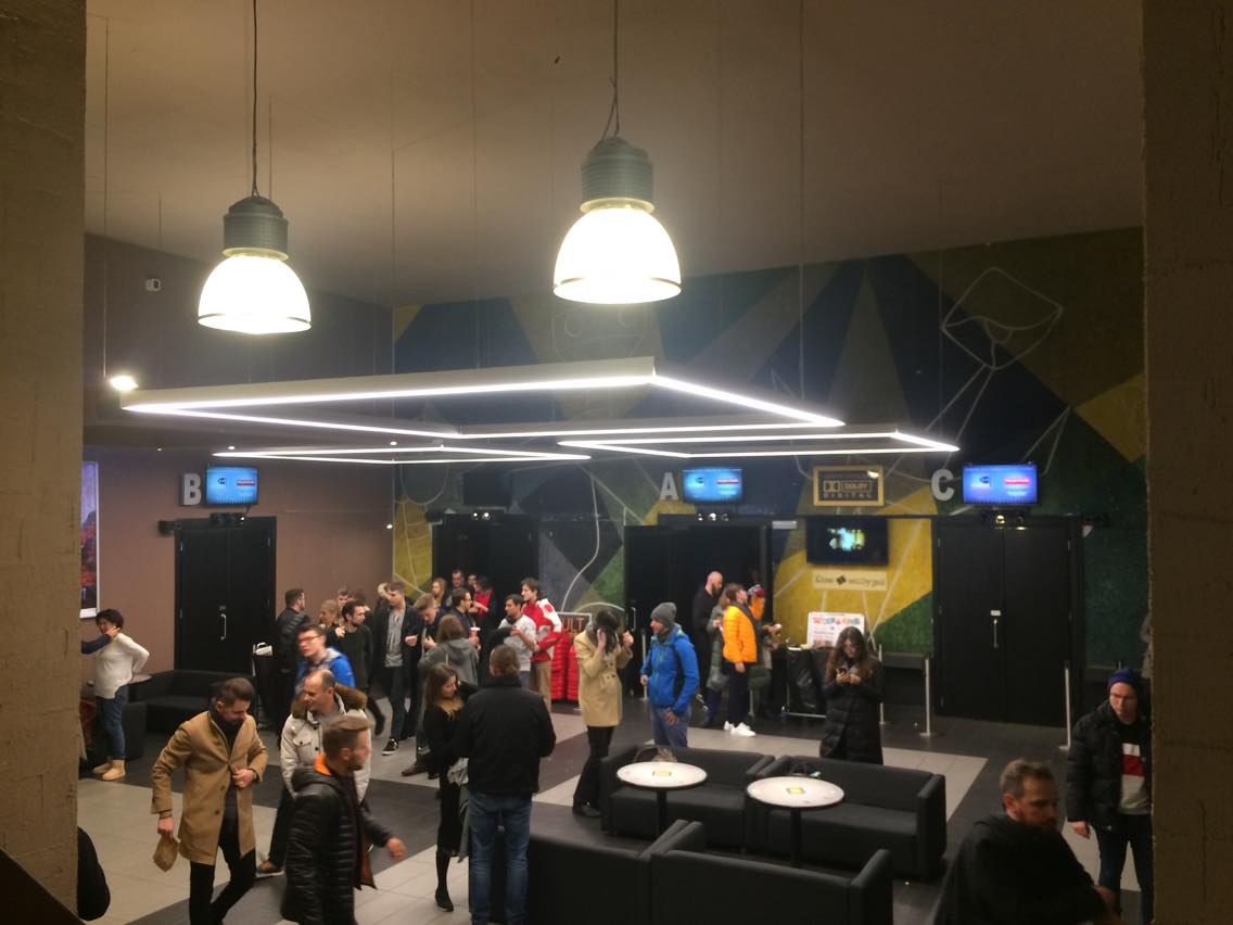 Wyjście z sali kinowej z pokazu filmu o Jordanie Petersonie